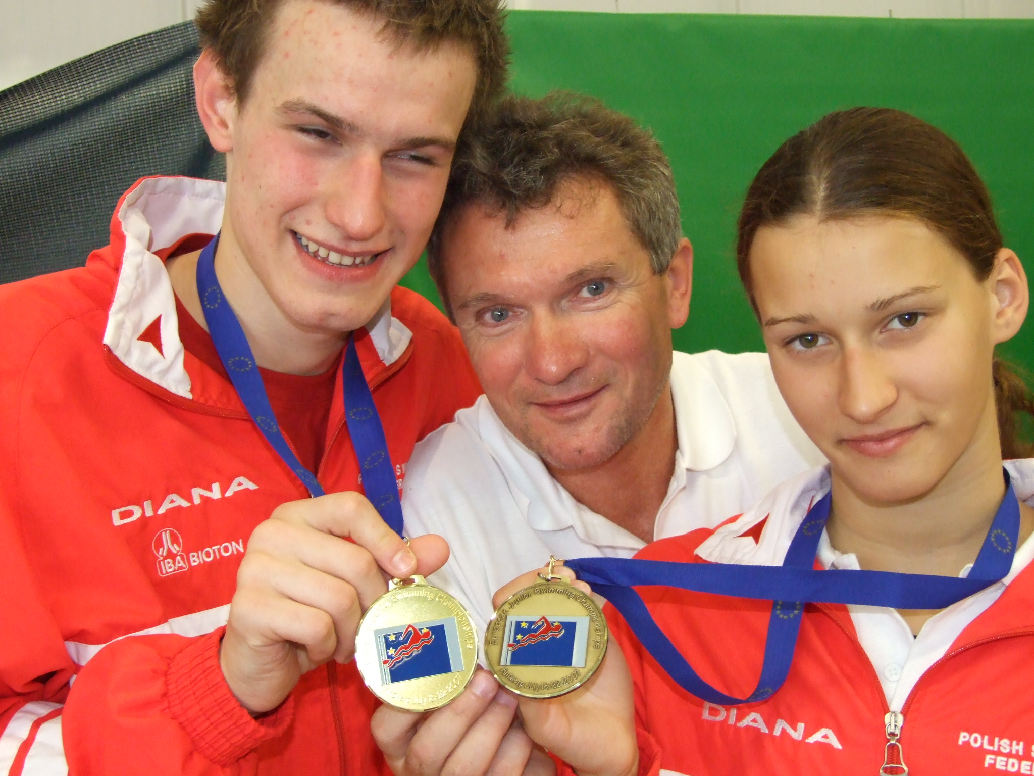 Stoją od lewej Maciej Hreniak, trener Marek Dorywalski i Zuzanna Mazurek, MEJ Antwerpia 2007